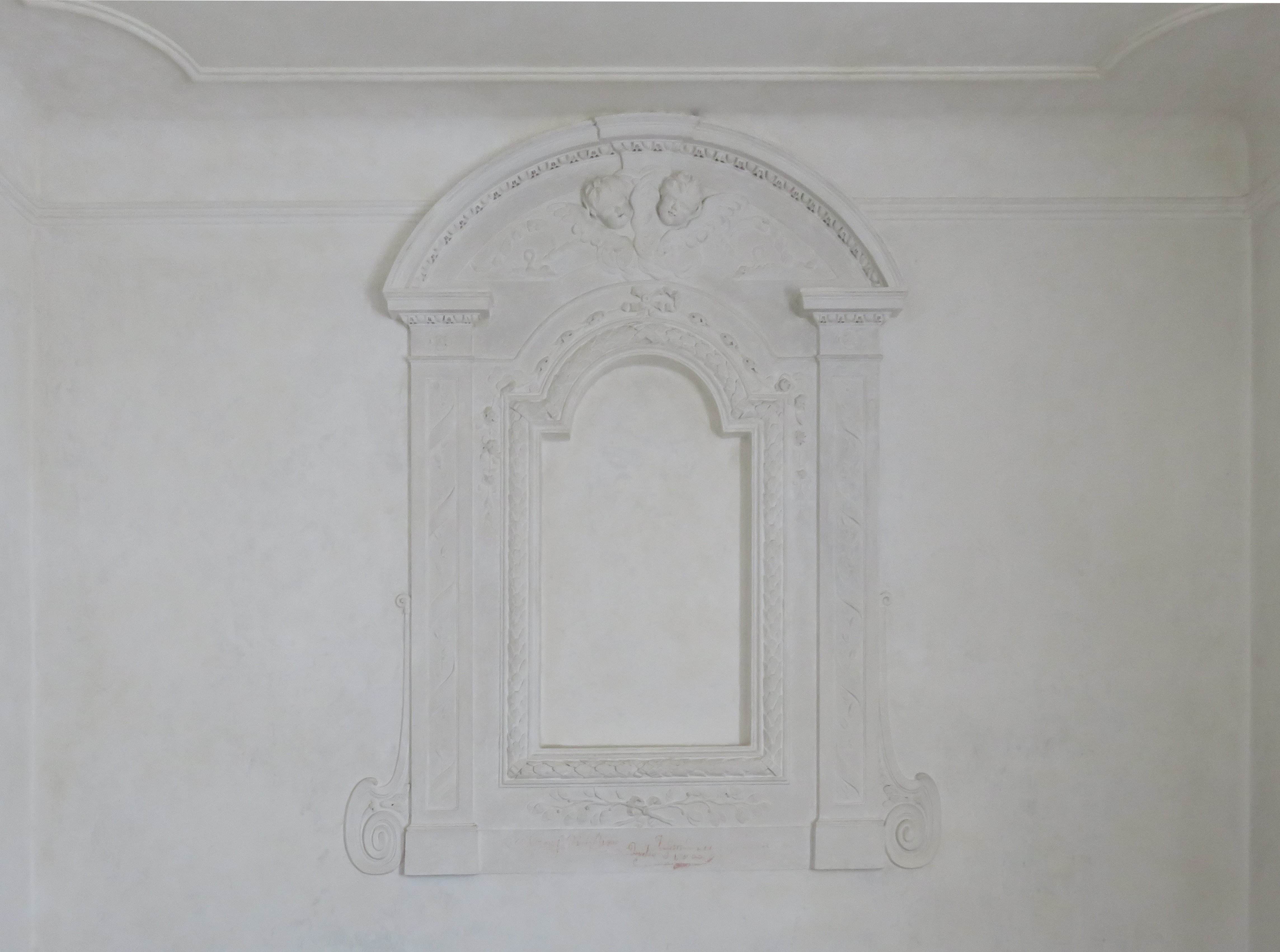 Palazzo Alberti Poja - La Cappella (particolare), ora utilizzata come ufficio, nell'ala sud dell'edificio. Si trova esterna al normale percorso museale